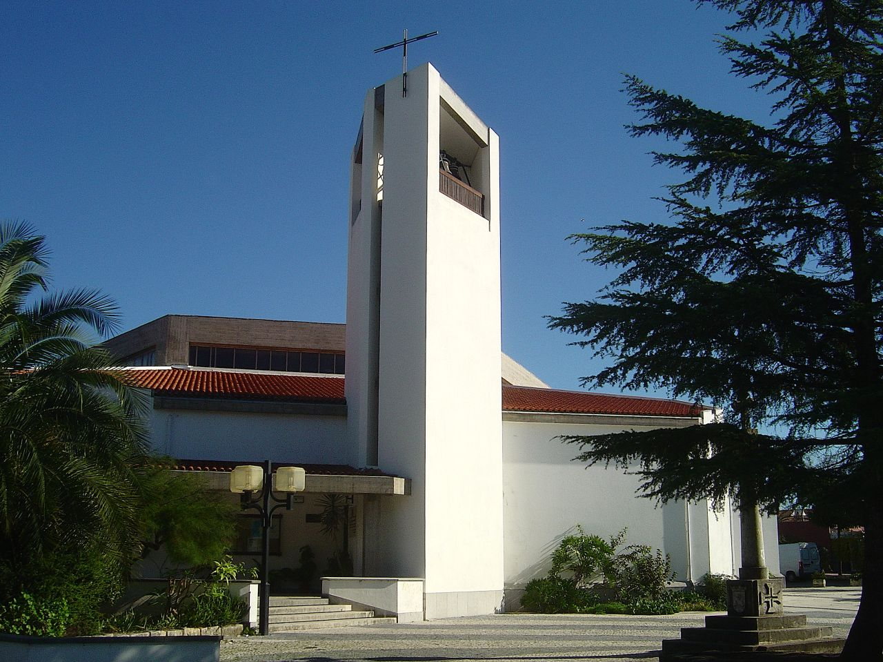 Rio Maior